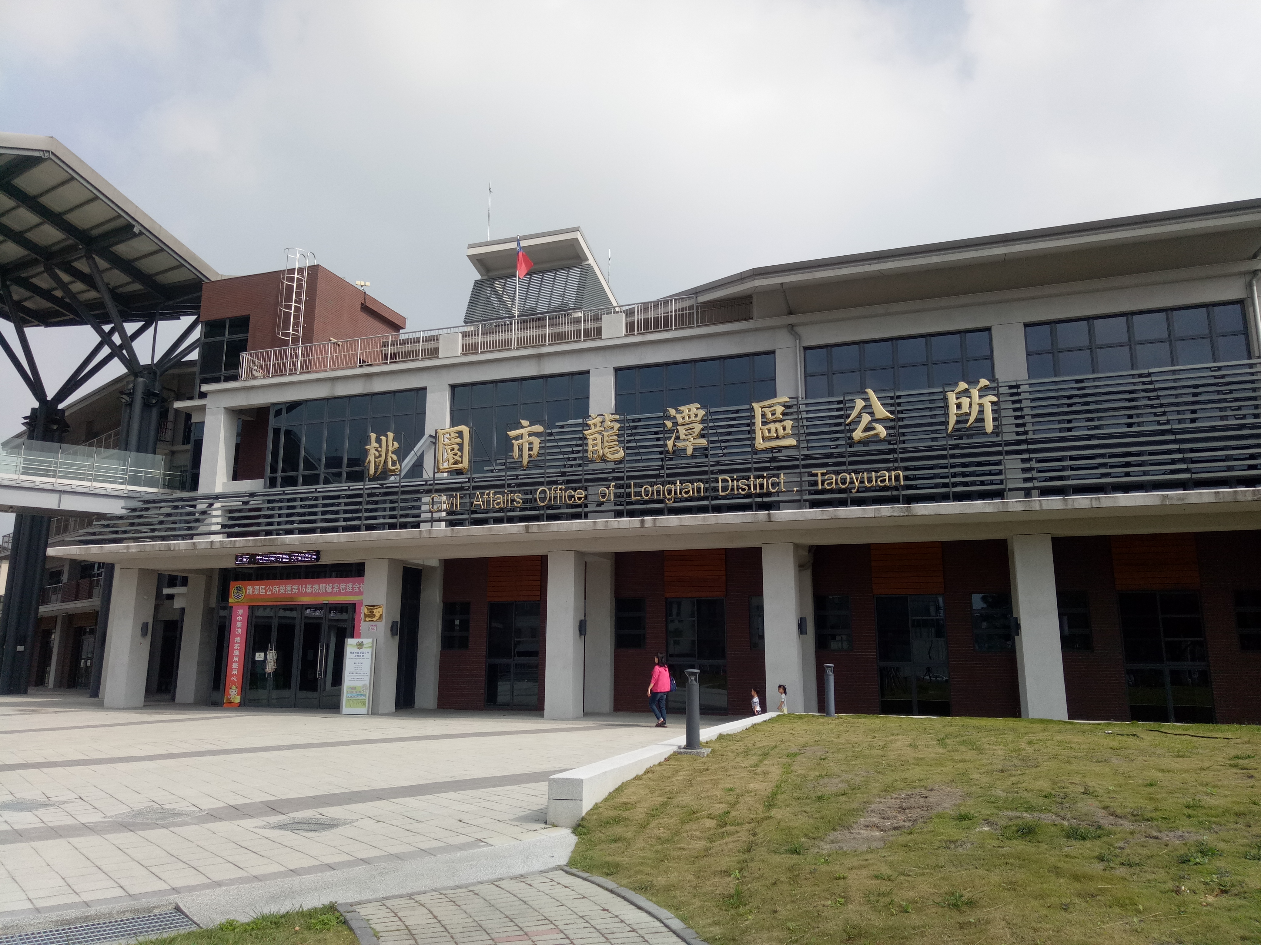 桃園市龍潭區公所位於龍潭行政園區的新館。